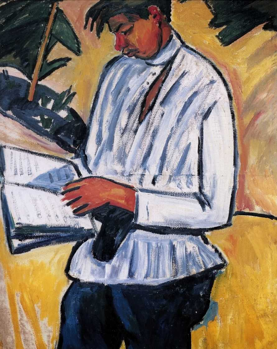 Ларионов Михаил Федорович. Портрет поэта Велимира Хлебникова. 1910